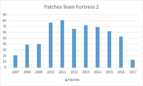 Stand Juni 2017 von Fabian Kaindl in Excel